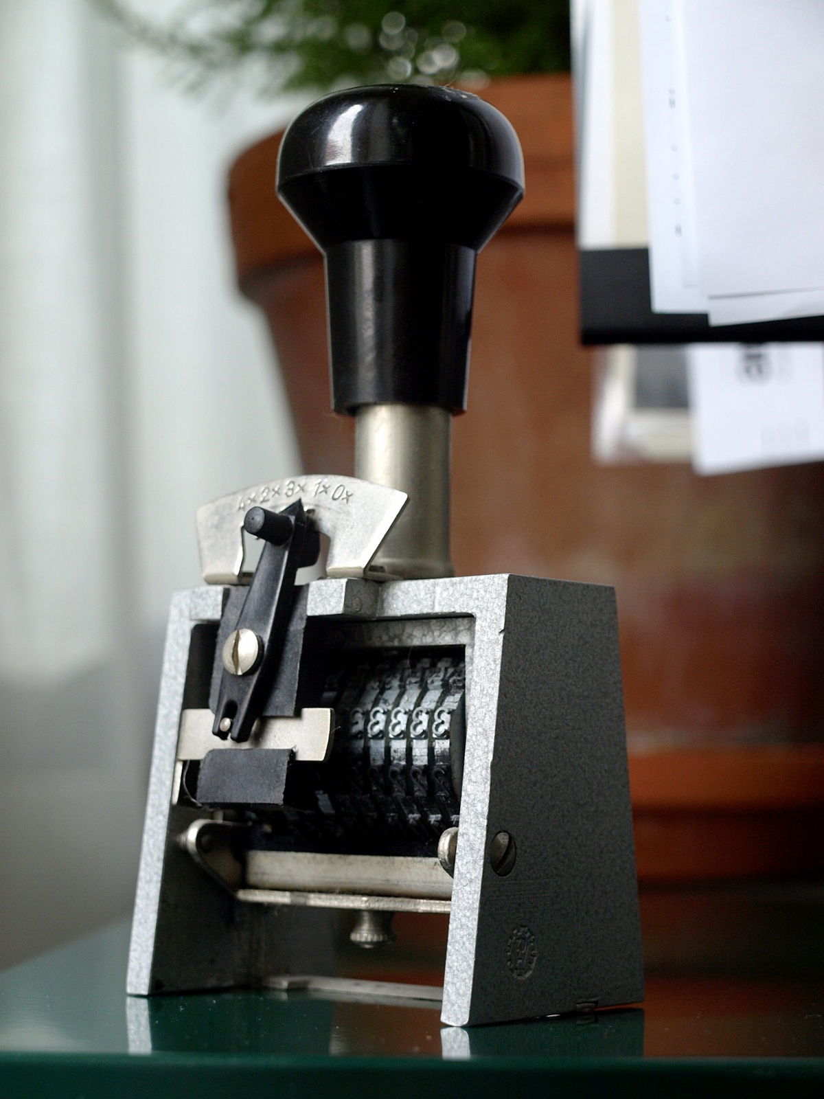 Paginierstempel aus Metall mit bis zu 4-facher Wiederholung